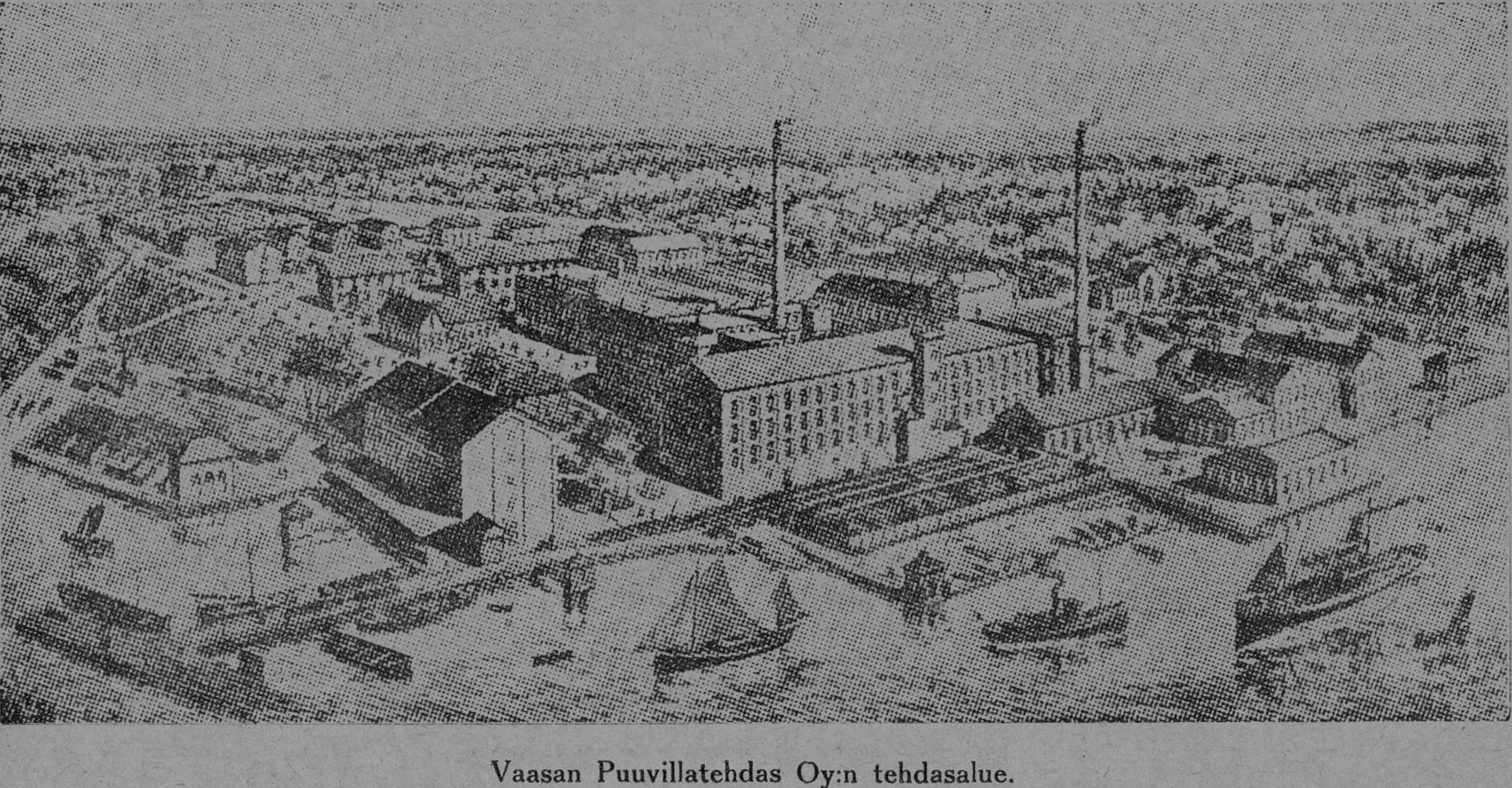 Vaasan Puuvillatehtaan alue